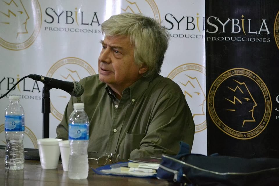 jhhhhh